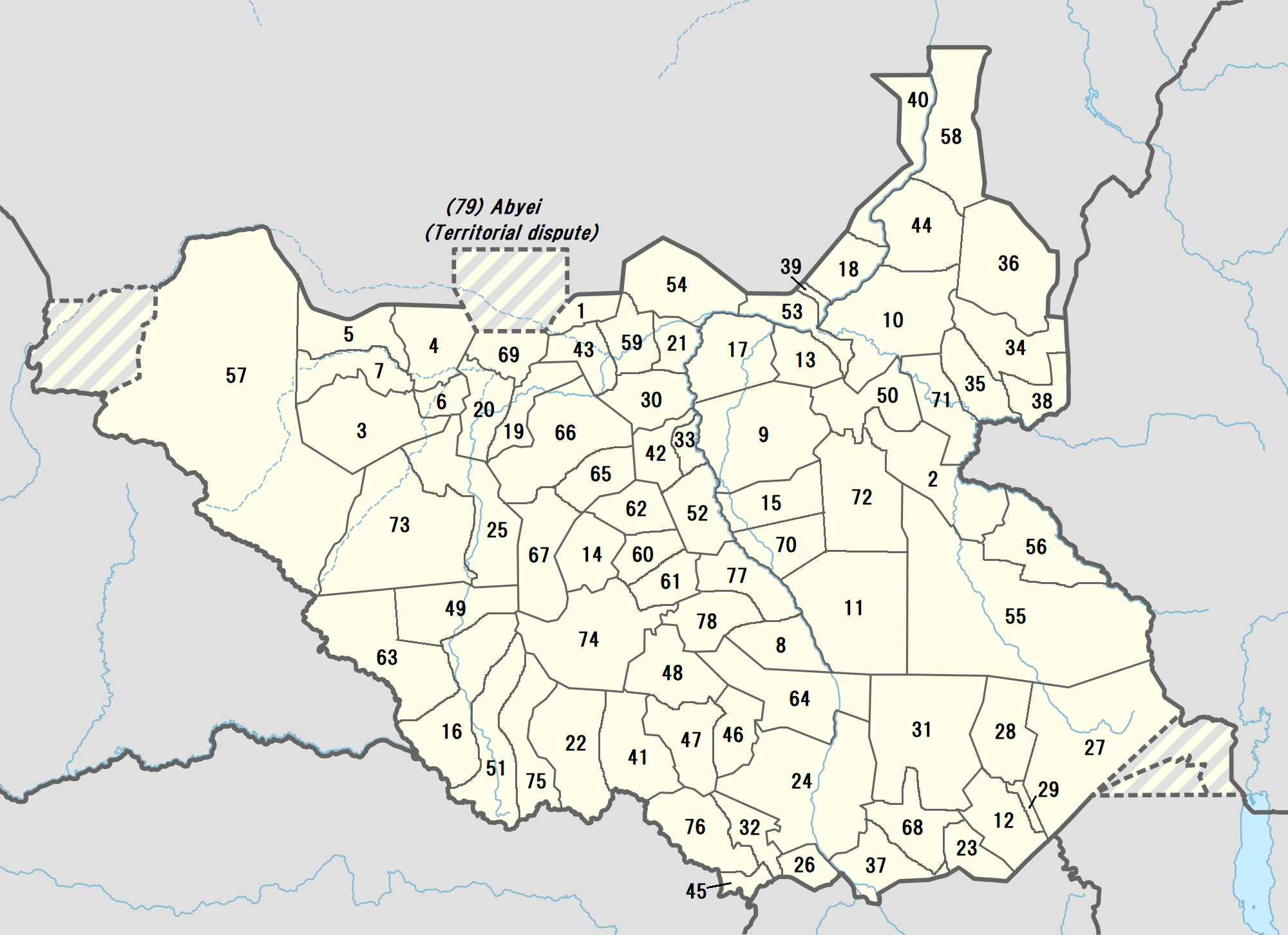 File:Counties of South Sudan 78.pngにアルファベット順の番号を入れたもの 参考 - [1] [2]